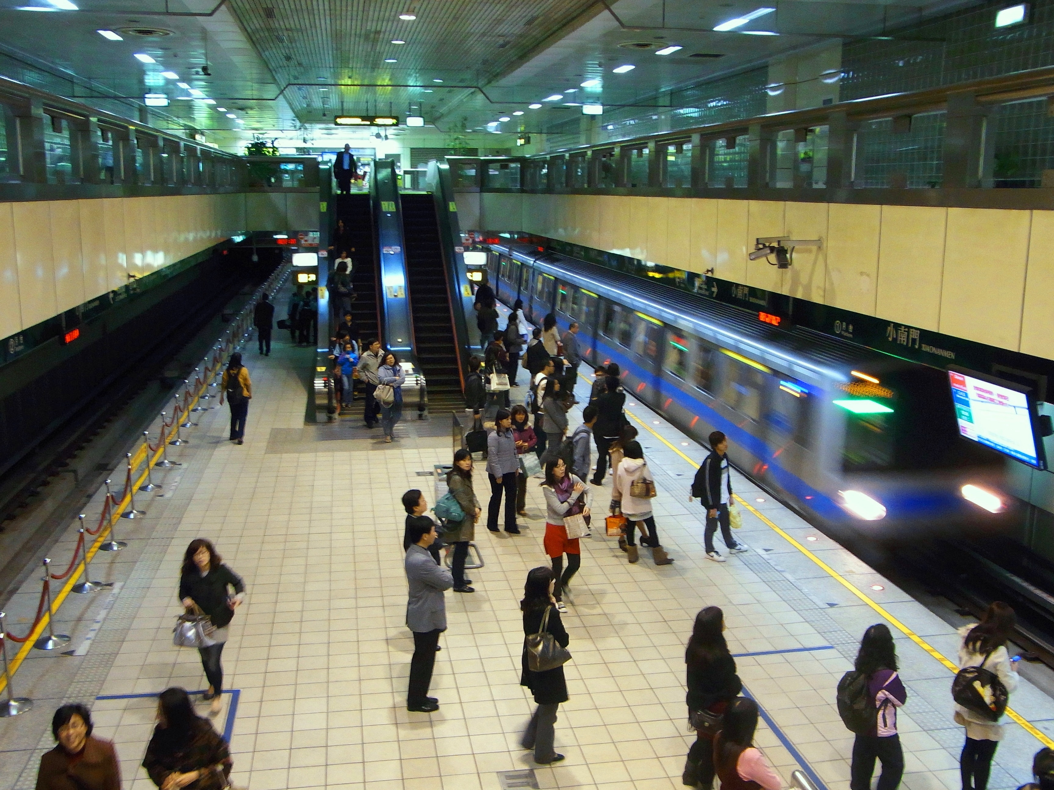 台北捷運小南門站月台